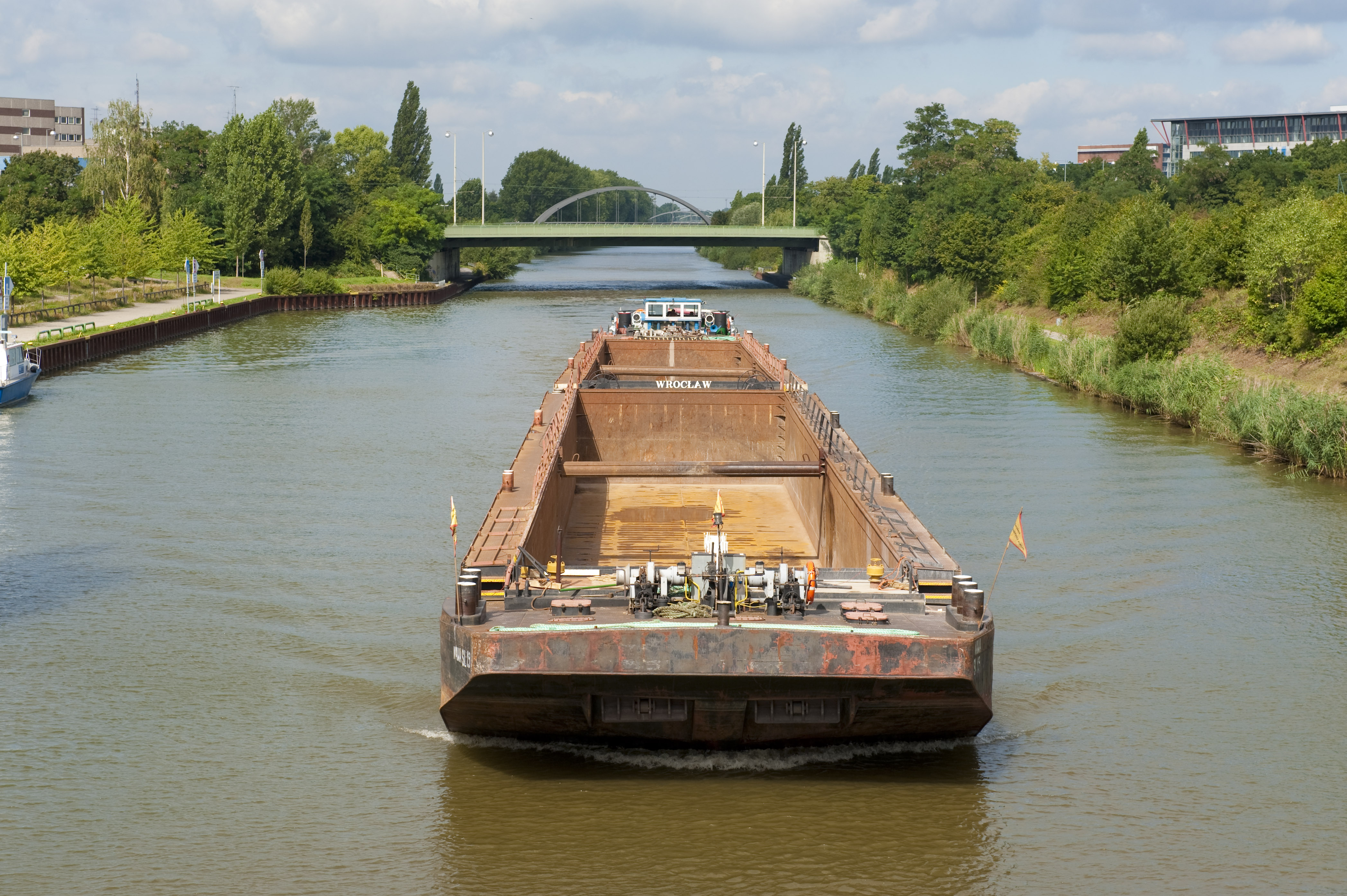 Barge Wroclaw, Mittellandkanal, Hannover